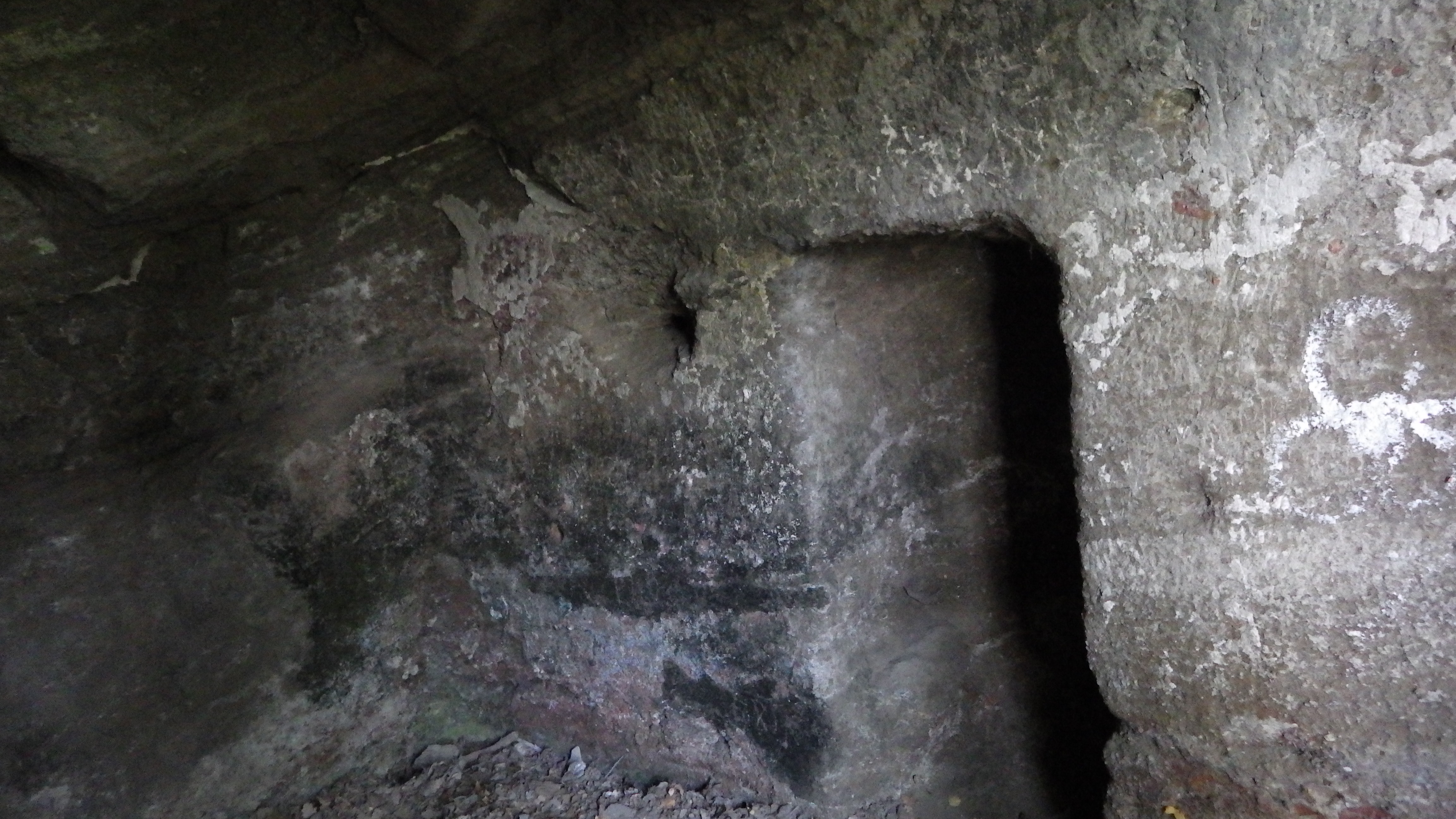 Einsiedlerhöhlen auf Tihany